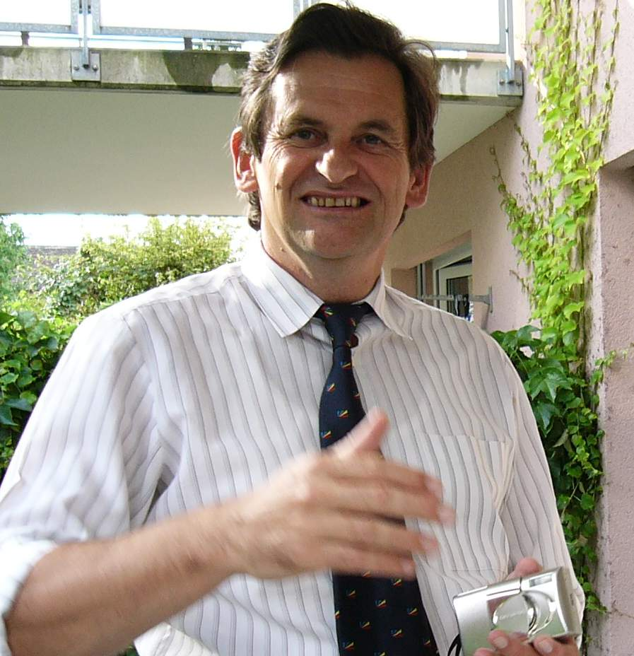 The actor Max Rüdlinger delivering a speech in Oberrieden, Zürich, 10 July 2004